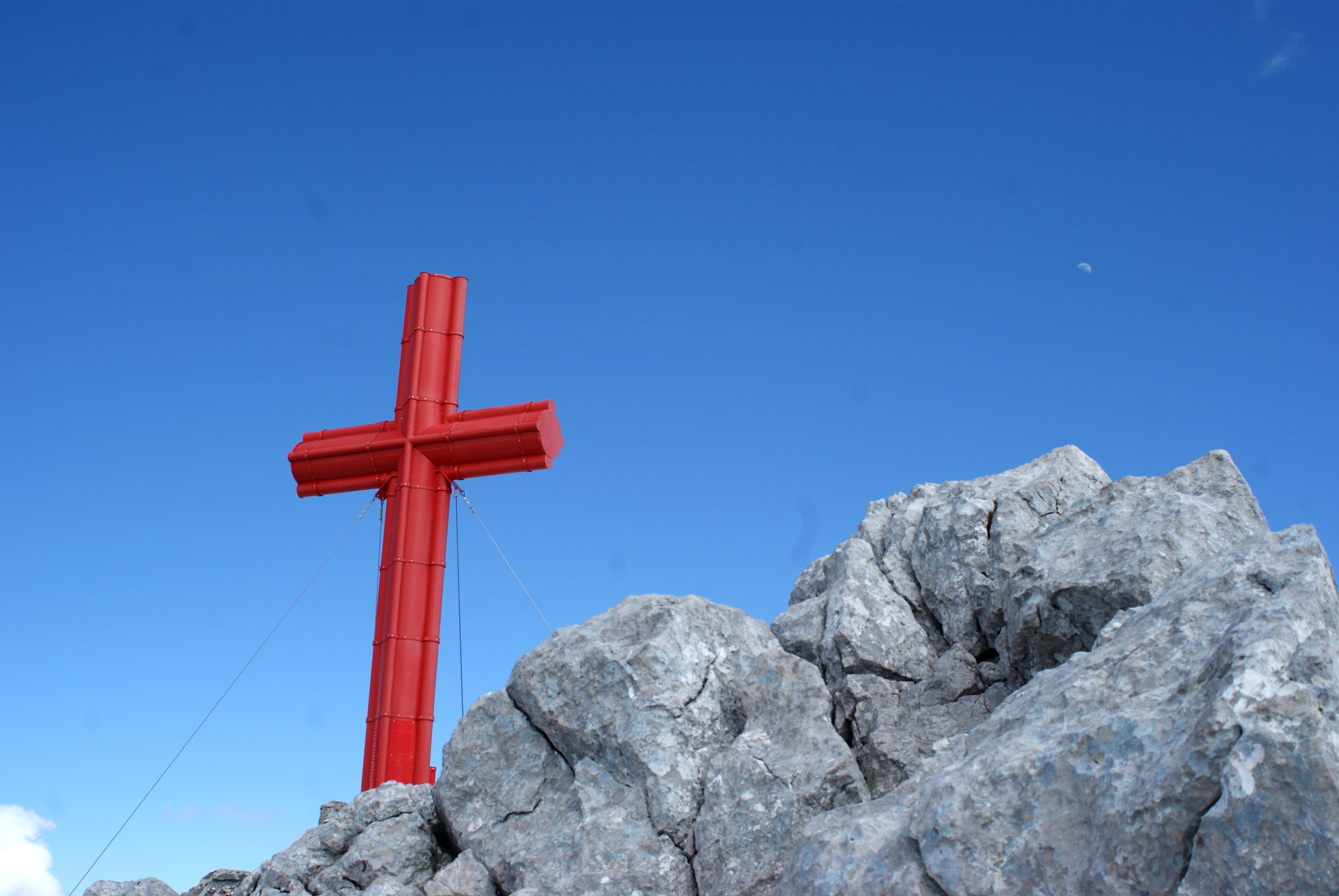 Das Gipfelkreuz des Großen Priel